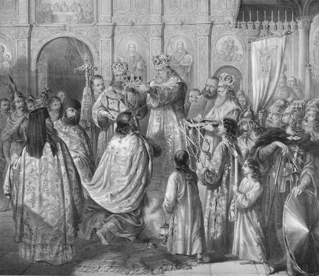 Свети Сава крунише свог брата Стефана Првовенчаног, Графике Анастаса Јовановића